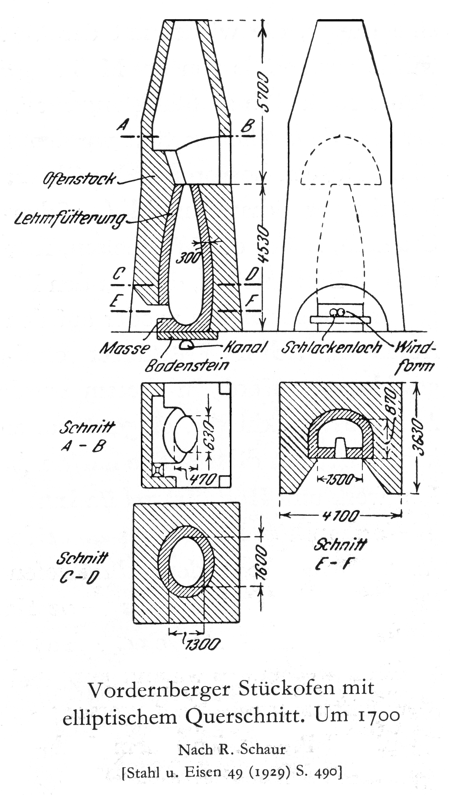 Vordernberger Stückofen mit elliptischem Querschnitt. Um 1700Nach R. Schaur [Stahl u. Eisen] 49 (1929) S. 490